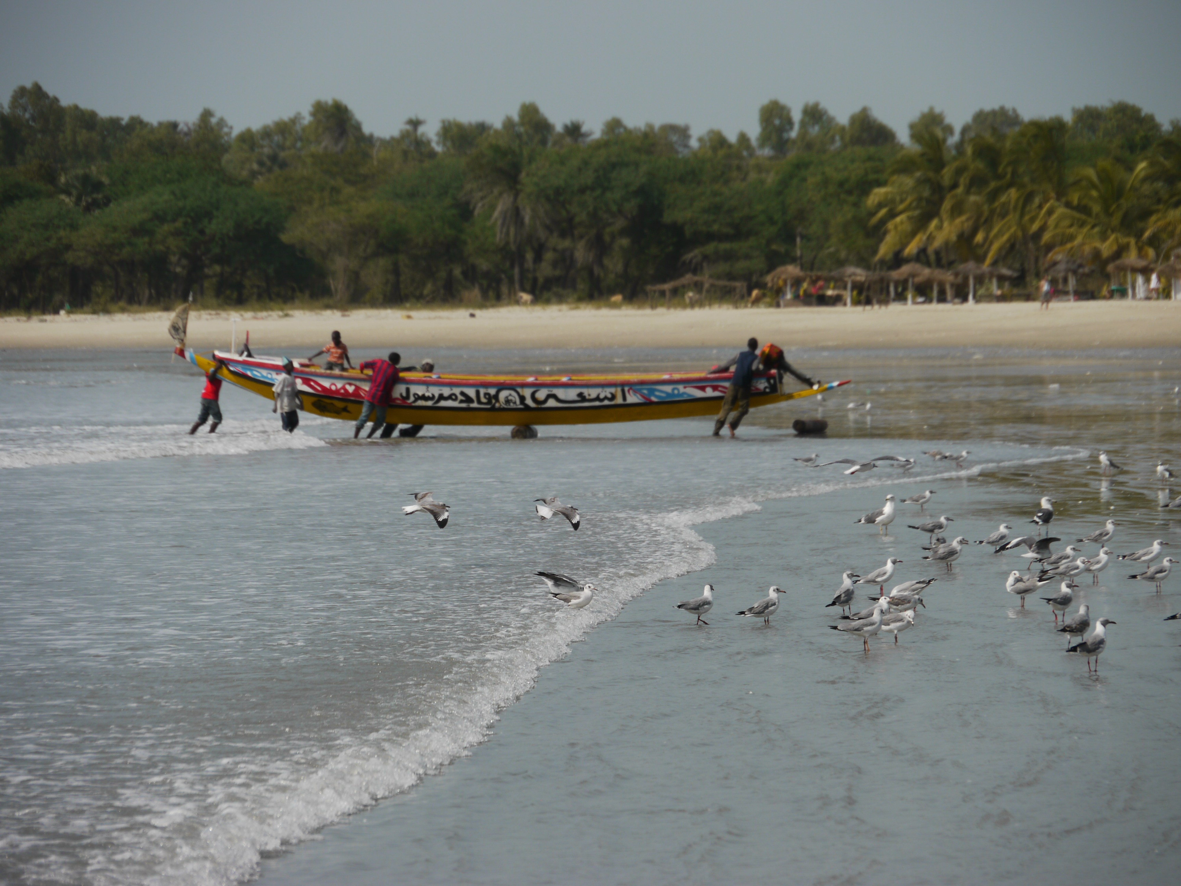 Gambia01SouthGambia087